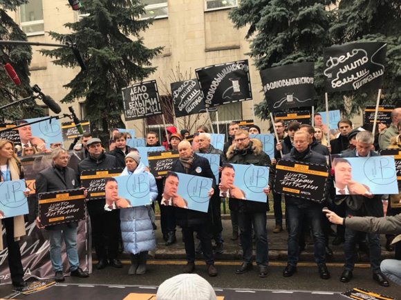 В Москве прошла акция в поддержку главного редактора портала «РИА Новости Украина» Кирилла Вышинского.